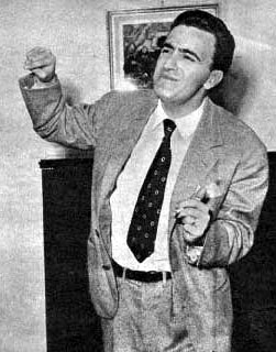 Il giornalista, critico cinematografico, sceneggiatore e regista italiano Giuseppe De Santis